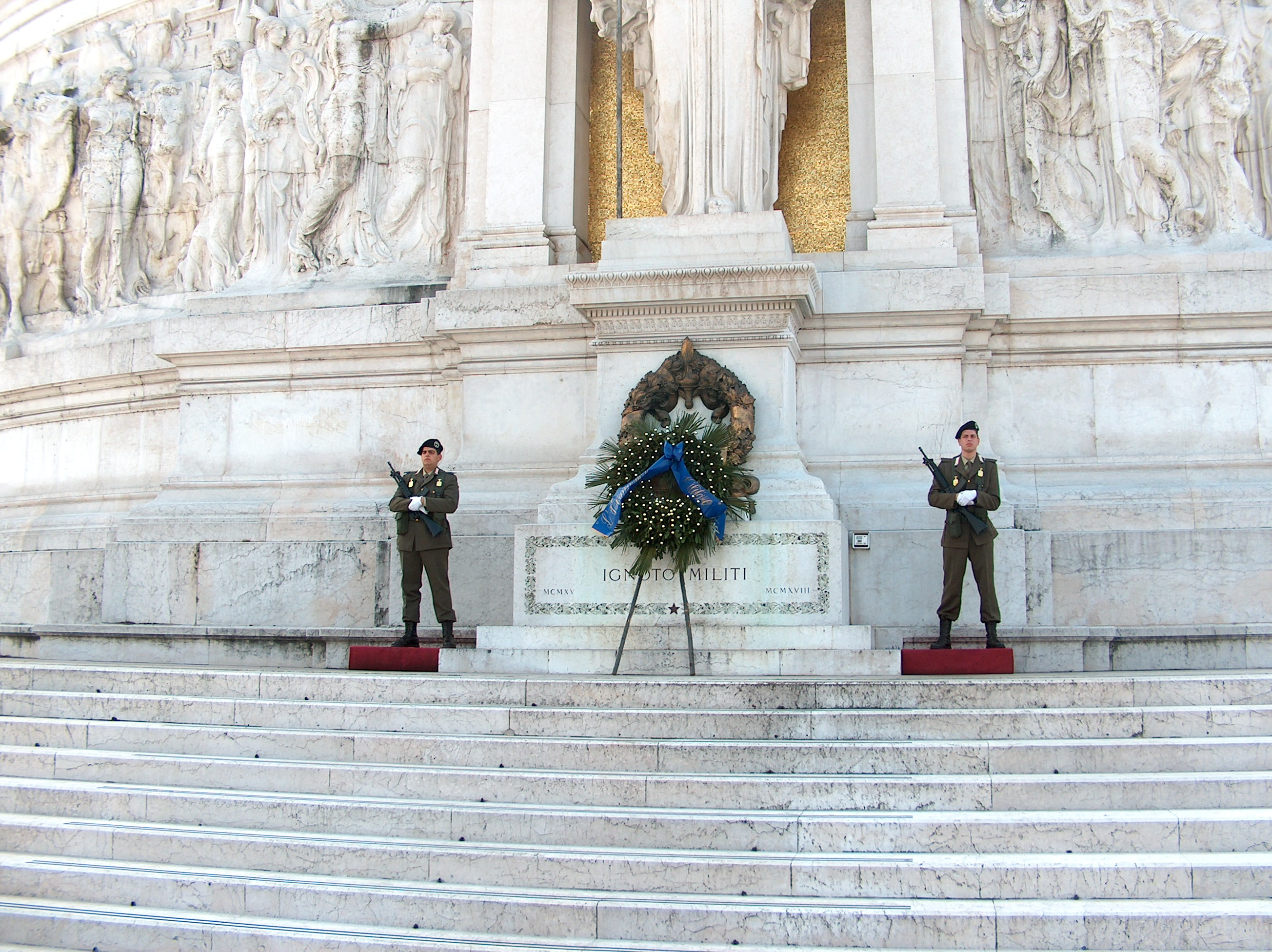 Guardia al Milite ignoto - Altare della Patria - Roma